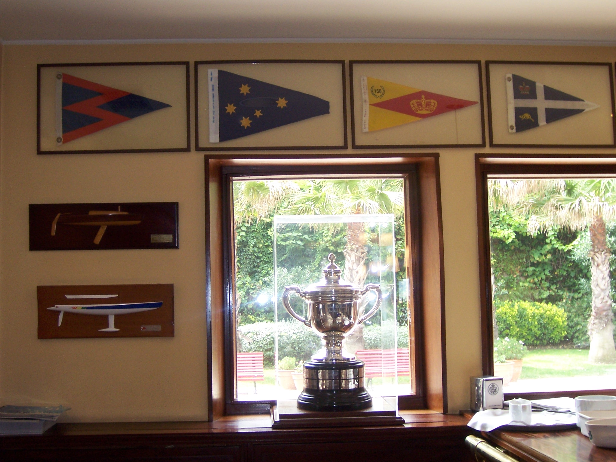 Trofeo Gran Premio El Gaitero